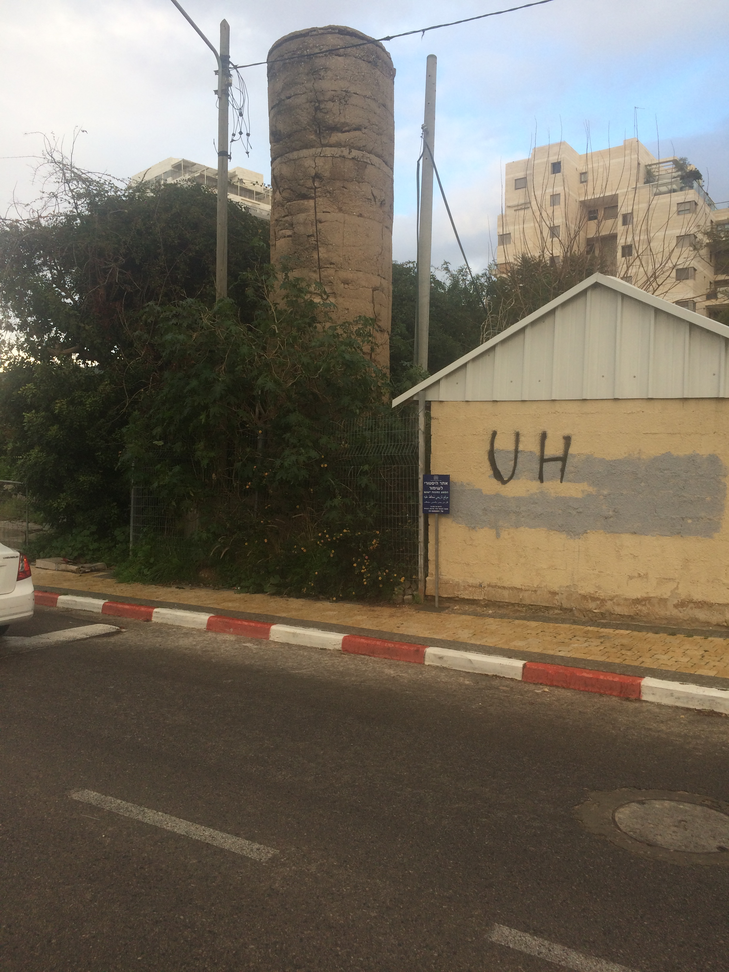 מגדל מים ולידו בית קטן המשמש לבאר. בחזית הבניין שלט של המועצה לשימור אתרים.